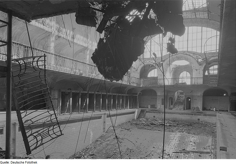 Original image description from the Deutsche Fotothek Ruine des Güntzbades